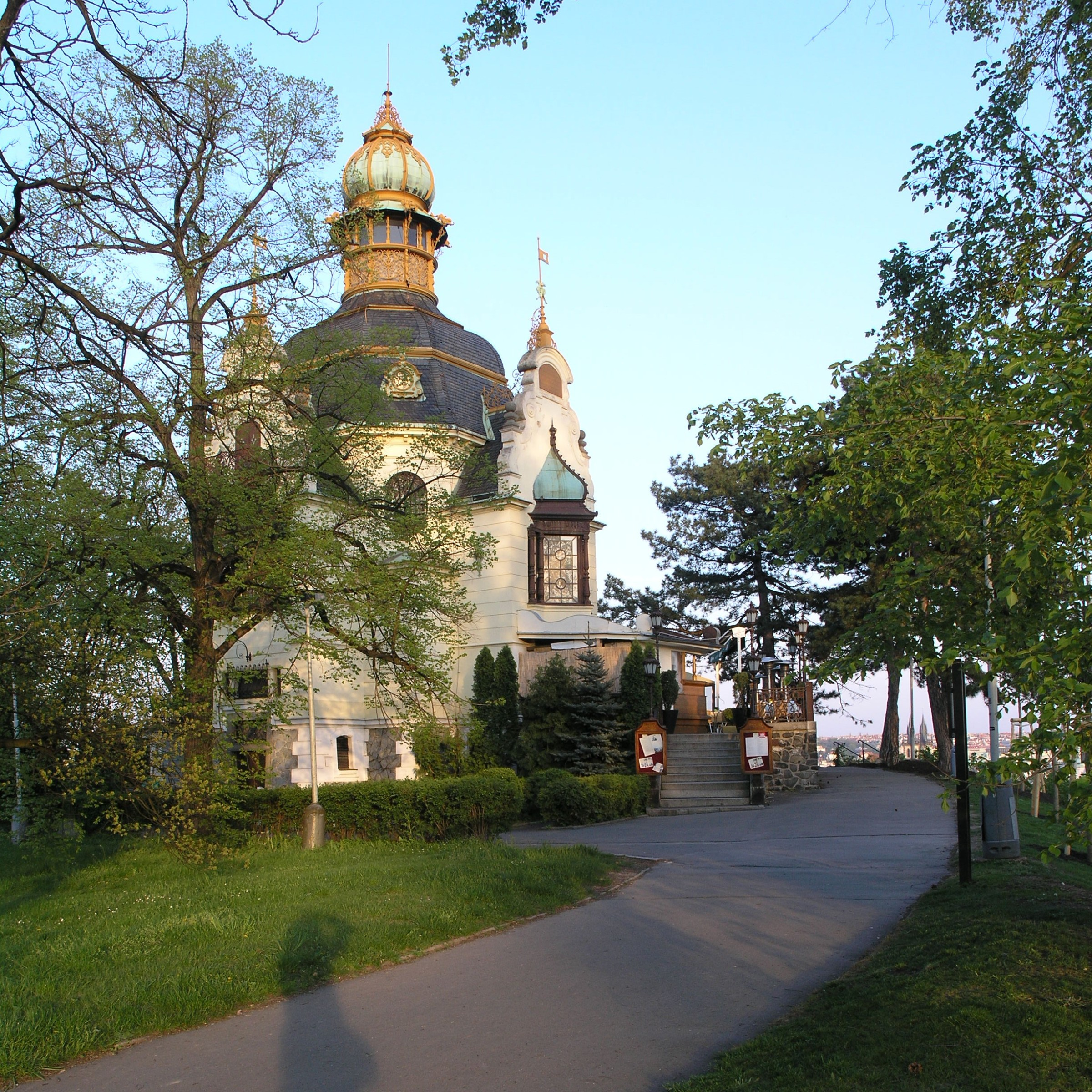 Hanavský pavilon v Praze, Letenských sadech